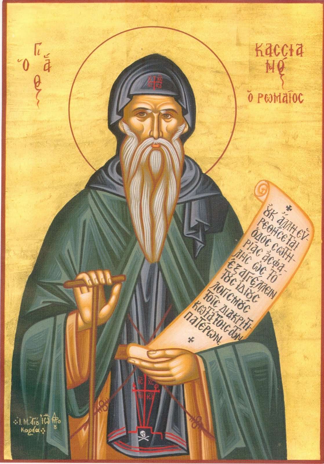 Saint John Cassian